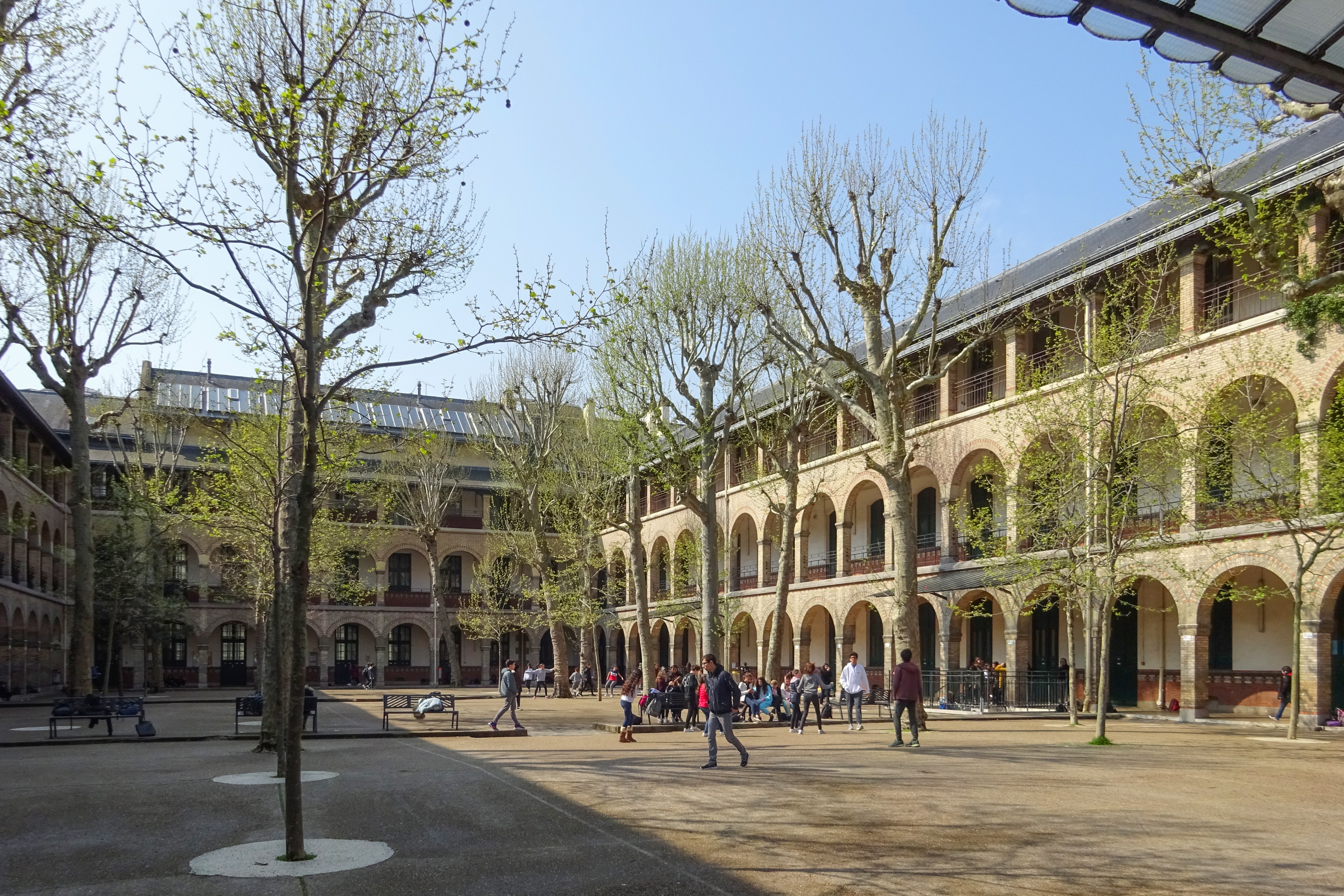 Cour du lycée Molière (Paris, 16e).